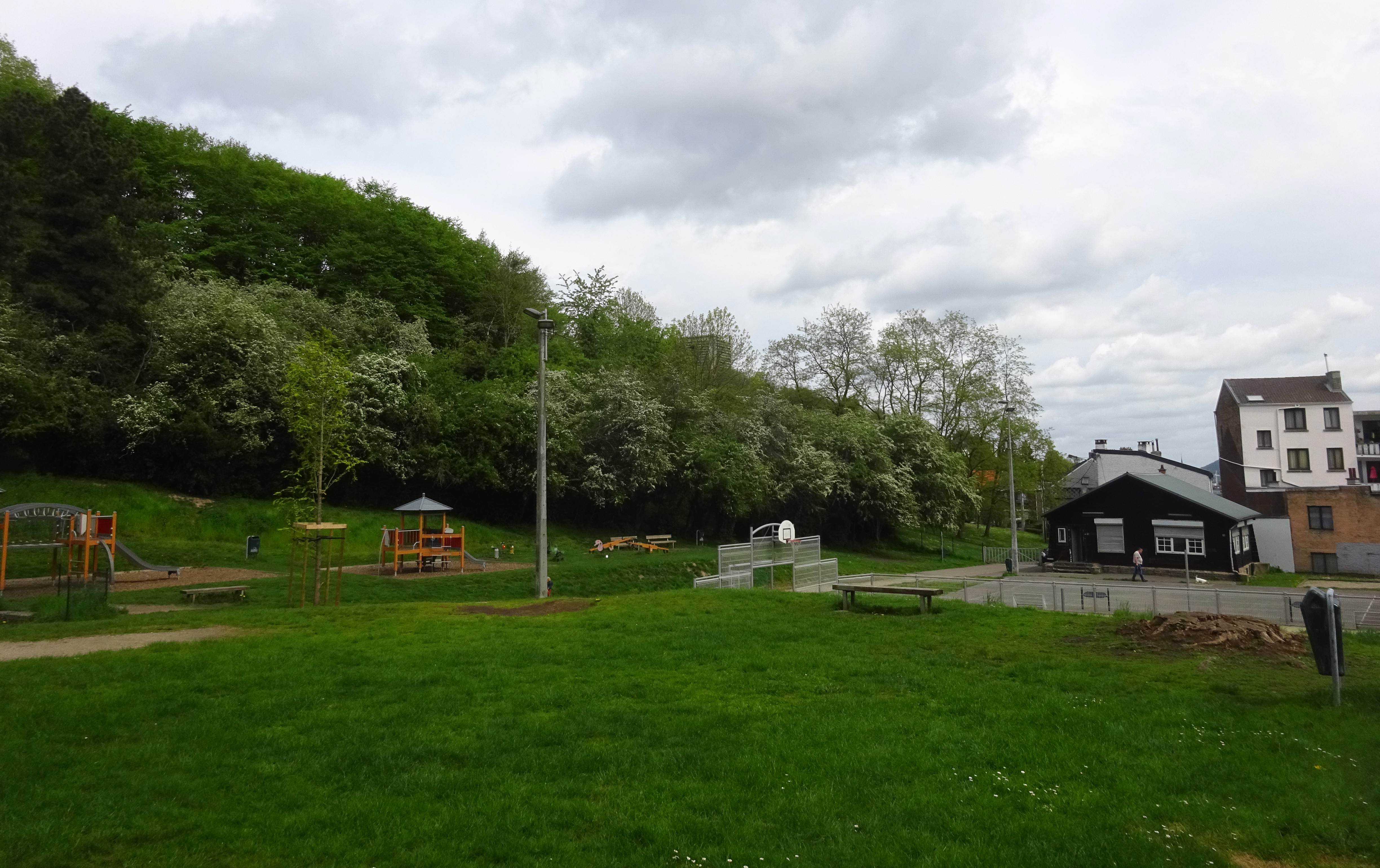 Parc Comhaire, Rue Comhaire, Laveu, Liège